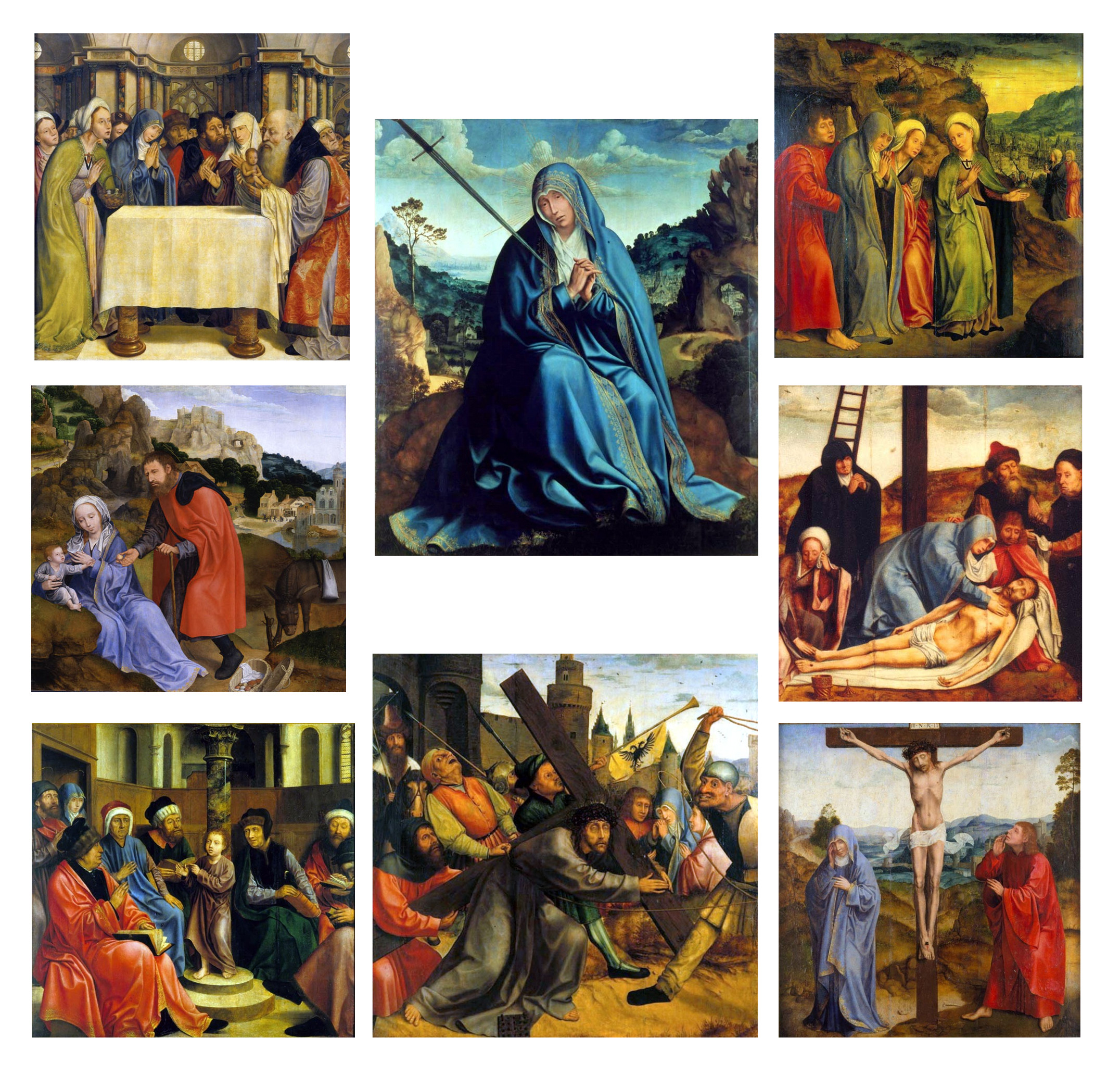 Kolaż "Poliptyk siedmiu boleści Marii" - Quentin Massys